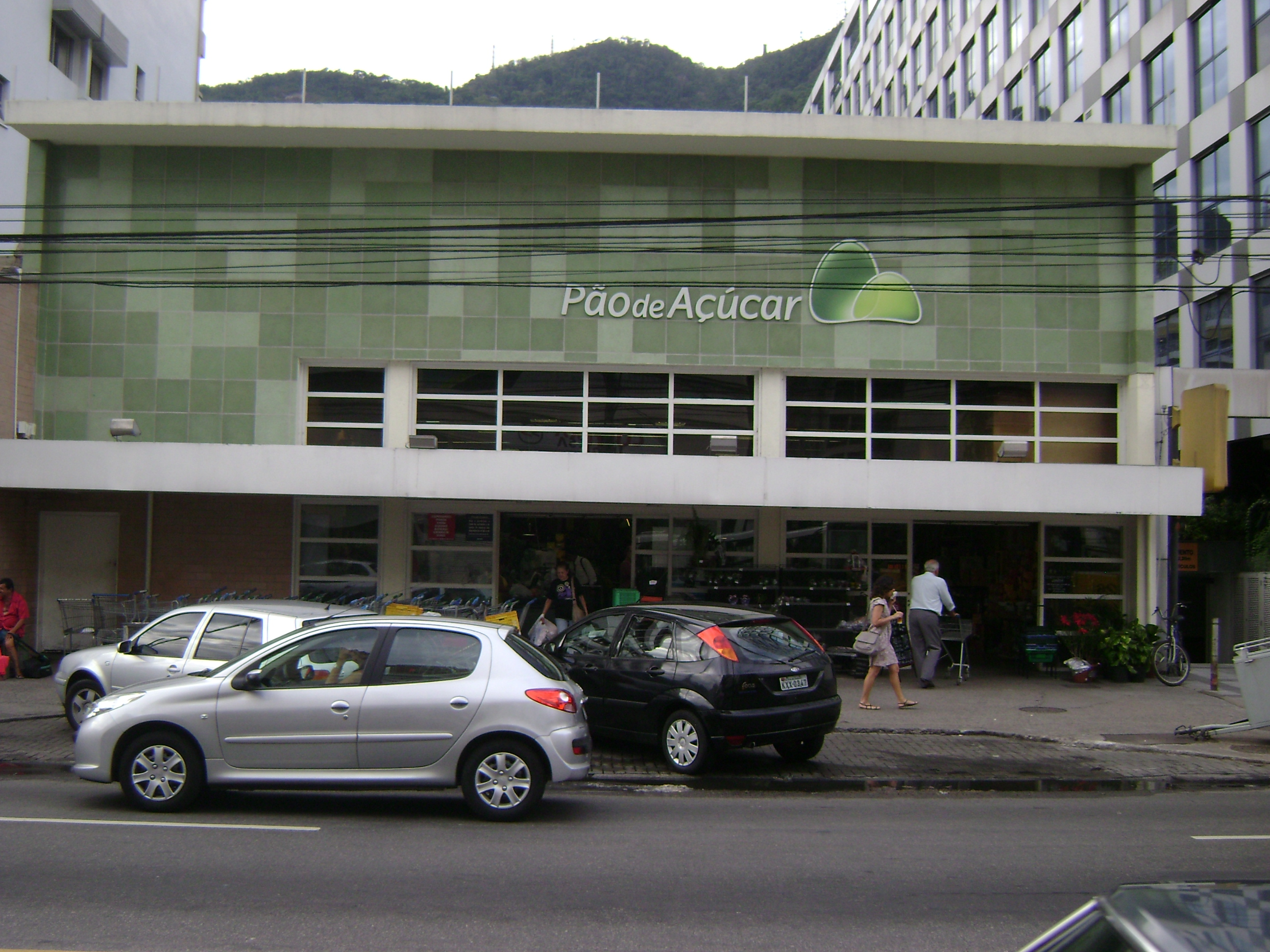 Loja do grupo Pão de Açúcar, na cidade do Rio de Janeiro, Brasil.